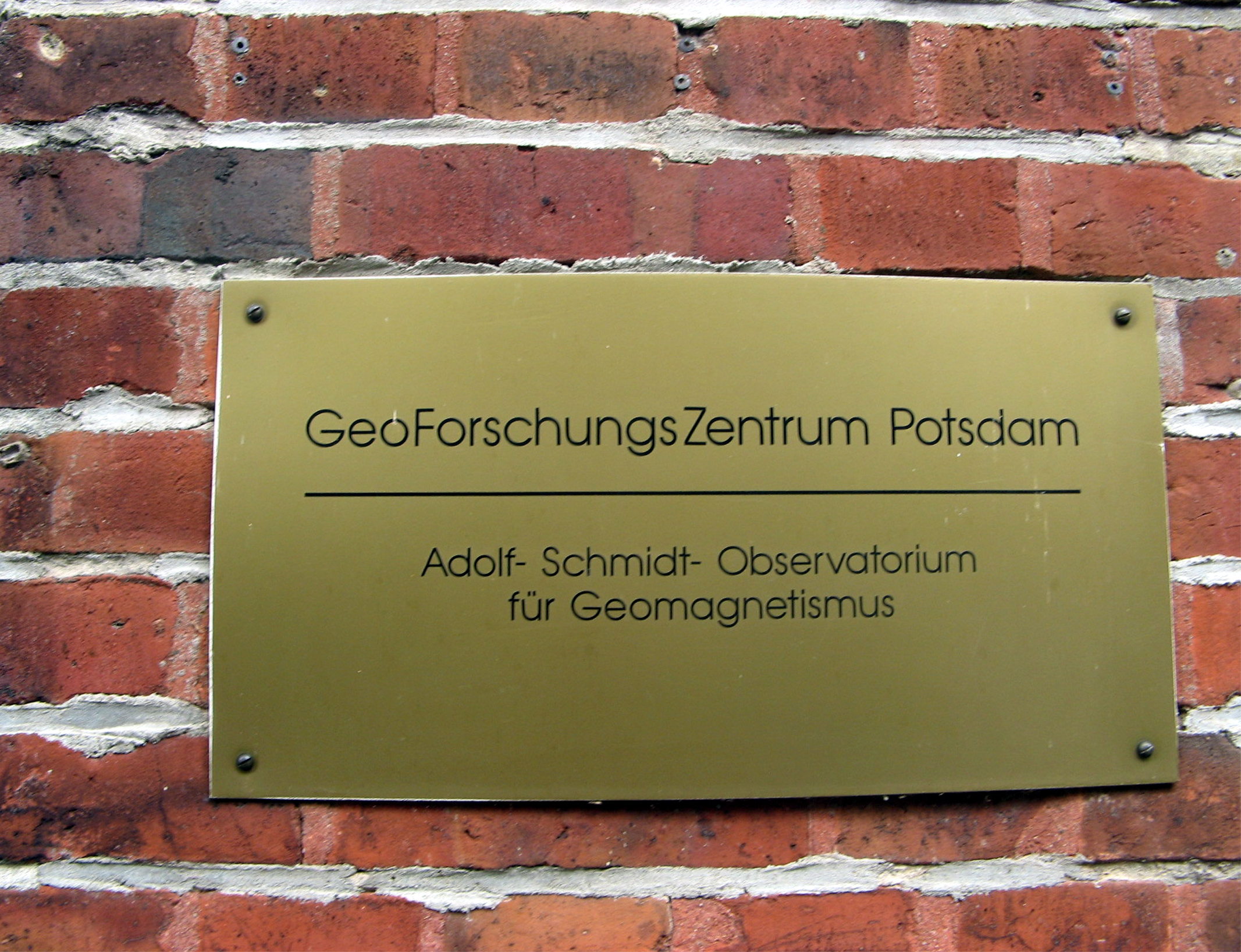 Schild am Eingang des heute zum Geoforschungszentrum Potsdam gehörenden Adolf-Schmidt-Observatorium für Geomagnetismus in Niemegk 2010. Das Observatorium wurde 1930 eröffnet und nach dem Geomagnetiker Adolf Schmidt (1860-1944) benannt, der es geplant und seine Verlegung von Potsdam nach Niemegk vorbereitet hatte.